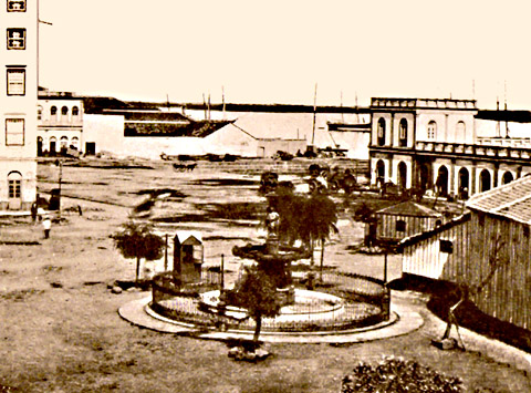 Praça do Paraíso - atualmente a Praça XV de Novembro - com o Chafariz da Hidráulica Porto-Alegrense e com o Mercado Público ao fundo. Uma das laterais da Doca do Carvão também pode ser observada.